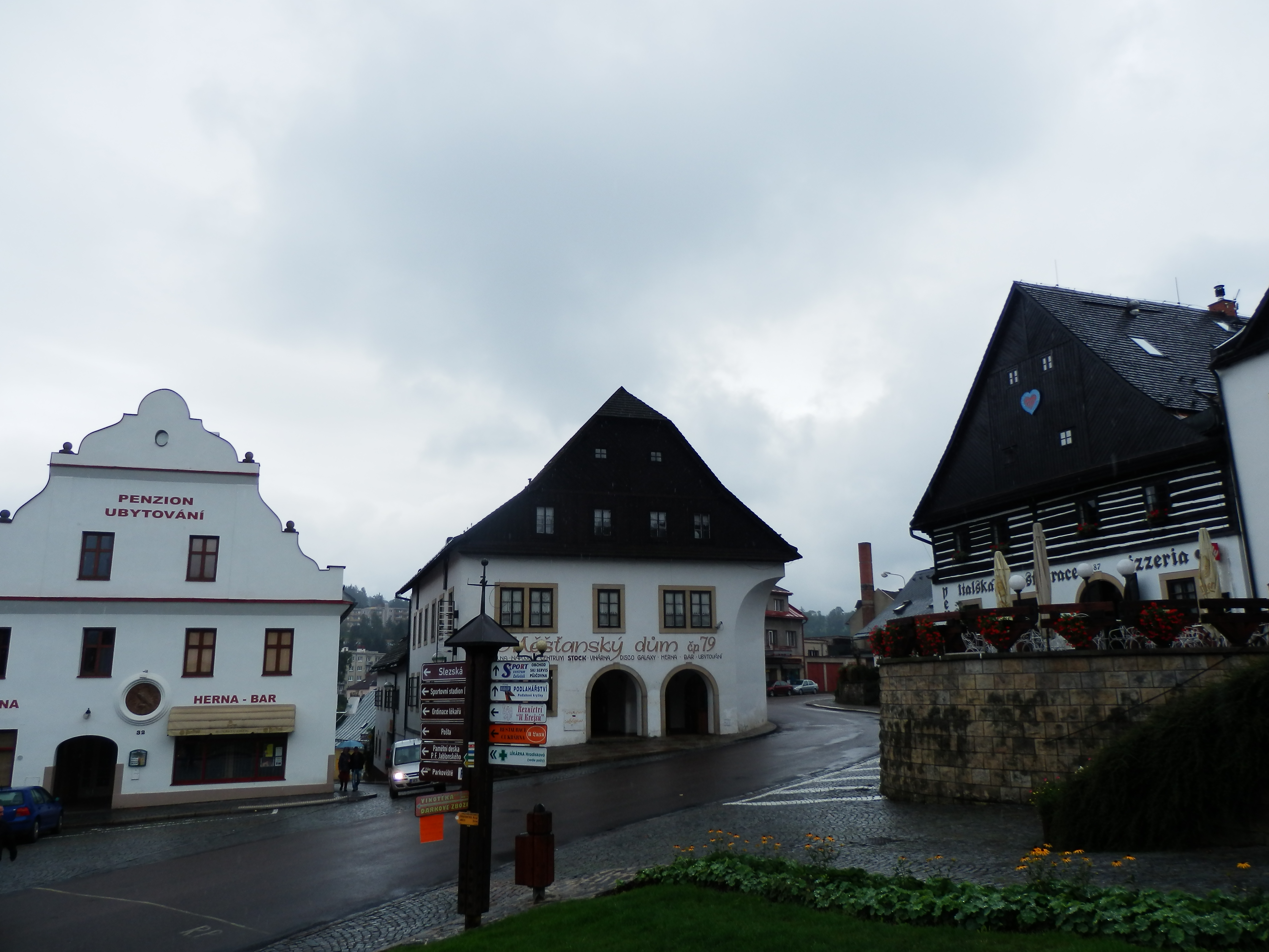 Dům čp. 32, náměstí 5. května 32, Jablonné nad Orlicí.